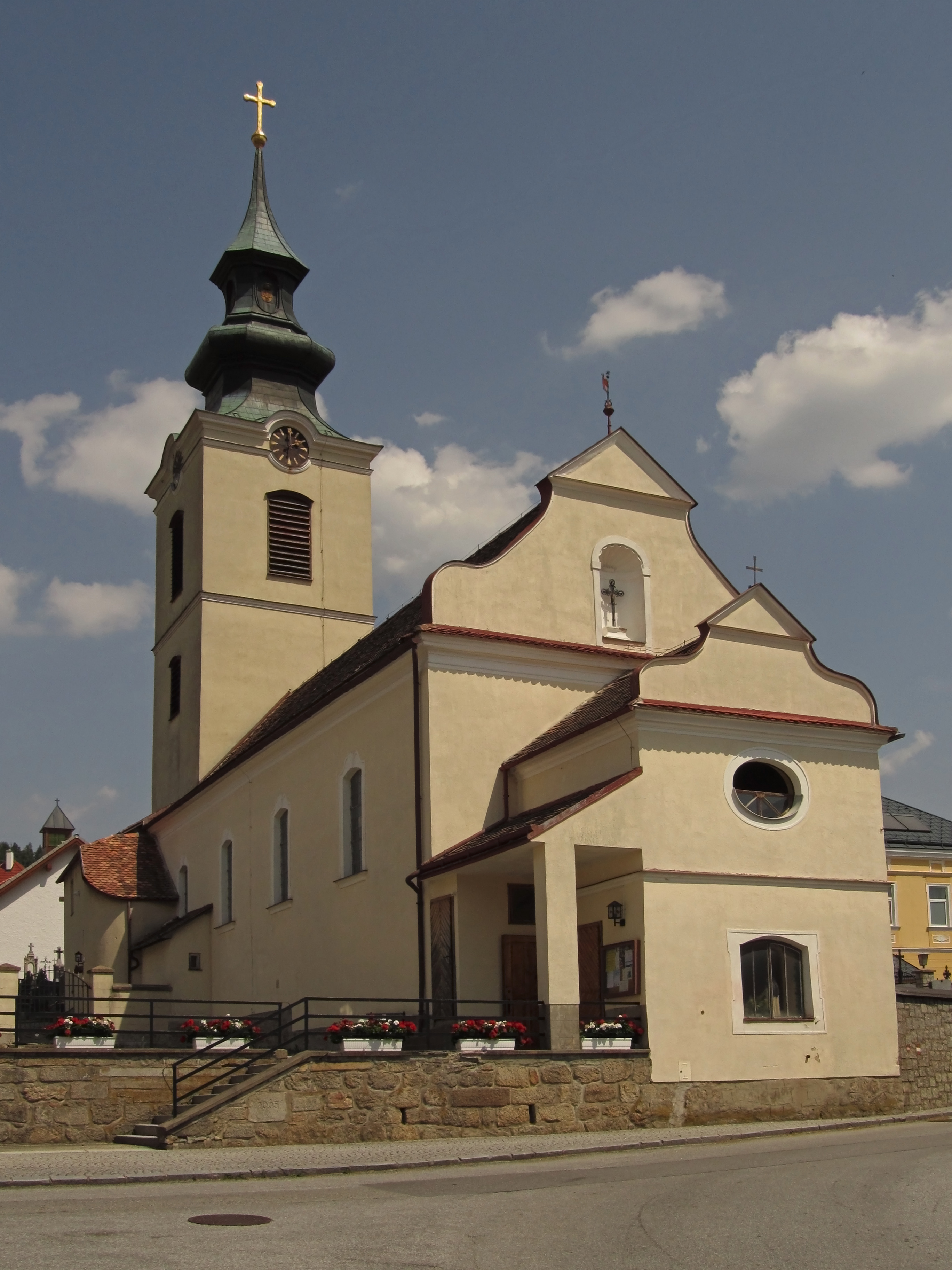 Kath. Pfarrkirche hl. Martin in Sankt Martin